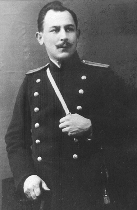 Павел Жаўрыд у часы Першай сусветнай вайны